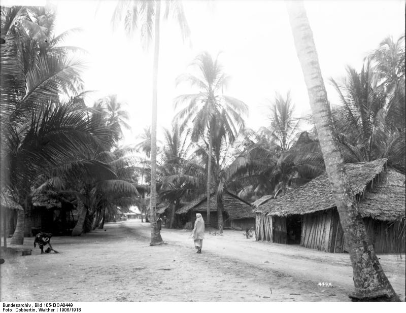 Pangani, Straße im Eingeborenenviertel